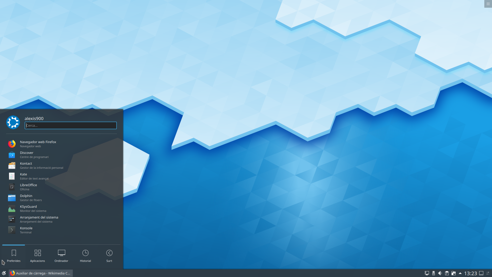 Captura de pantalla de KDE 5 Plasma en Català